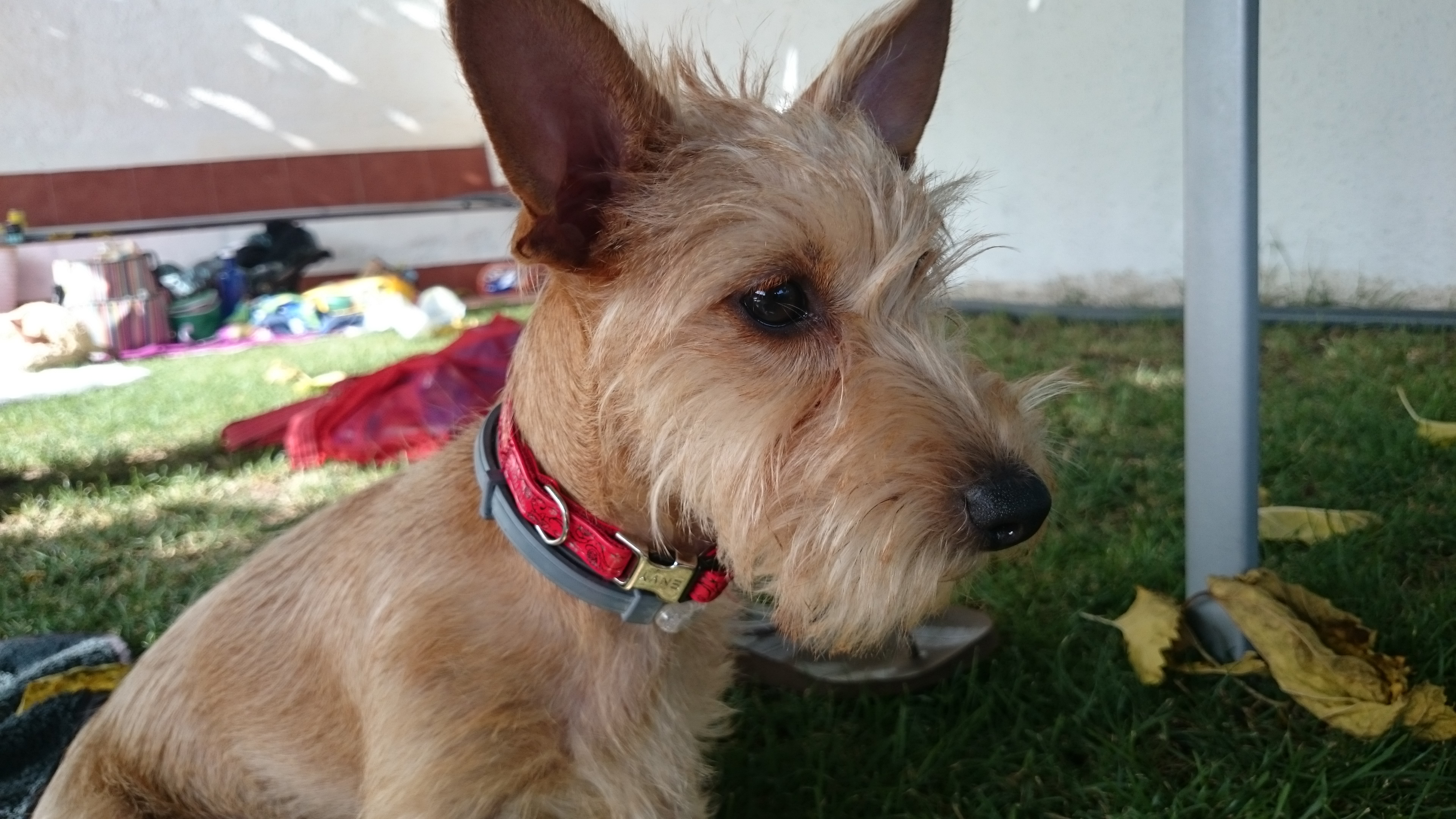 Perra de la raza Chiweenie. Mezcla de Chihuahua y Dachshund de pelo duro (o Teckel de pelo duro) o comúnmente llamado "perro salchicha". Se pueden apreciar las orejas en punta de los Chihuahua, morro alargado de los Dachshund aunque no llega a ser todo lo largo de la raza original.